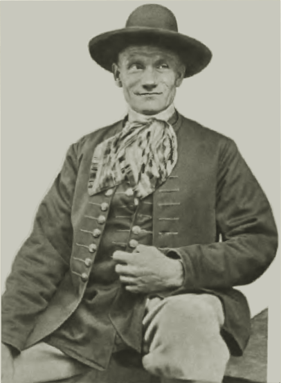 Bauer aus Roßberg in Oberschlesien in Tracht